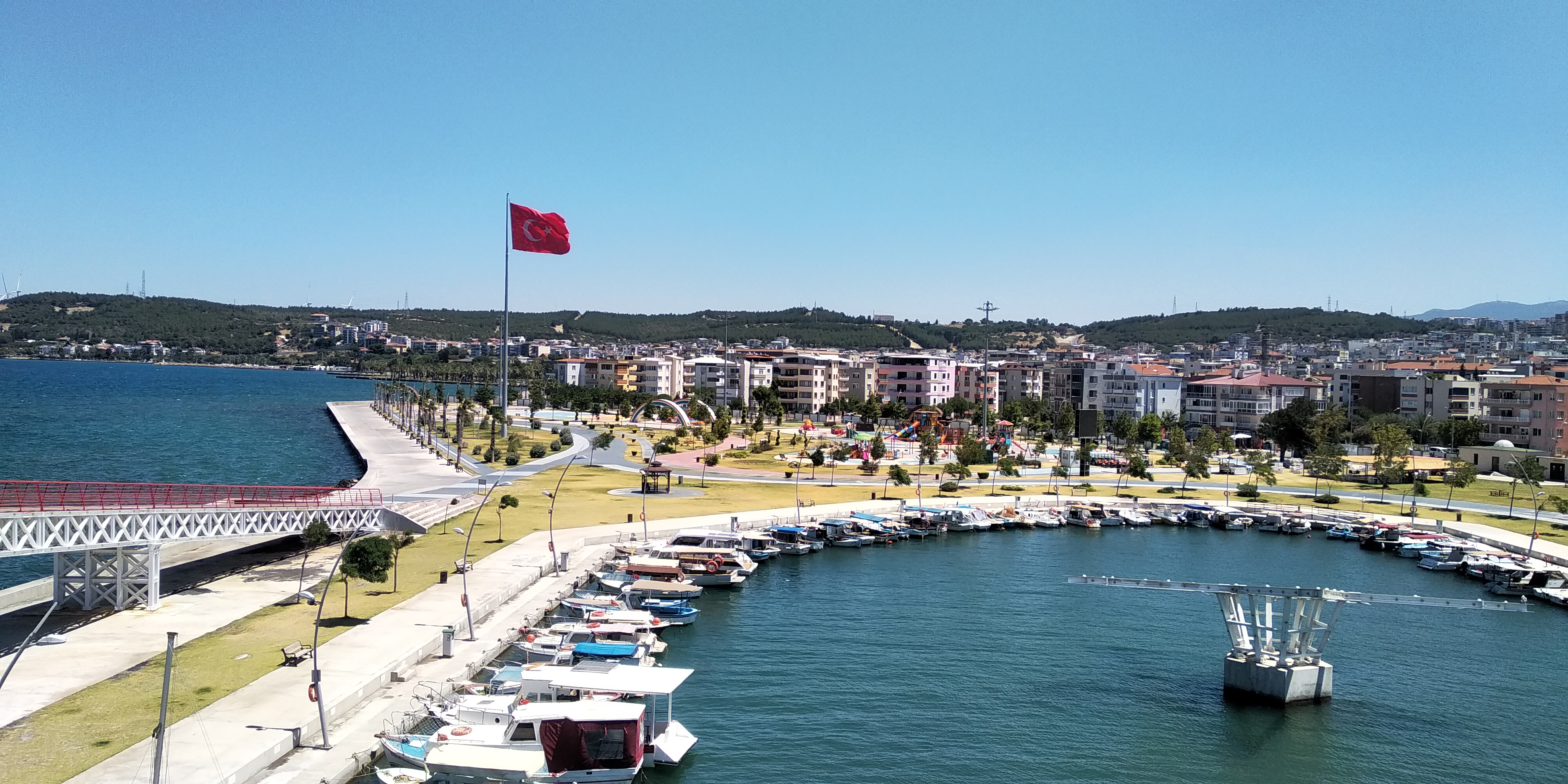 Aliağa Marina ve Çek Ek Yeri.